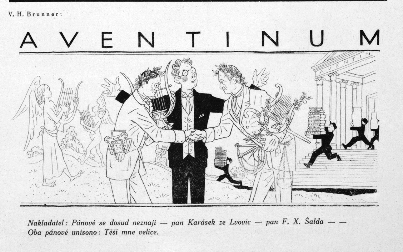 V. H. Brunner: AVENTINUM, Nakladatel: Pánové se dosud neznají - pan Karásek ze Lvovic - pan F. X. Šalda - - Oba pánové unisono: Těší mne velice. Karikatura z titulního listu prvního čísla Rozprav Aventina, září 1925